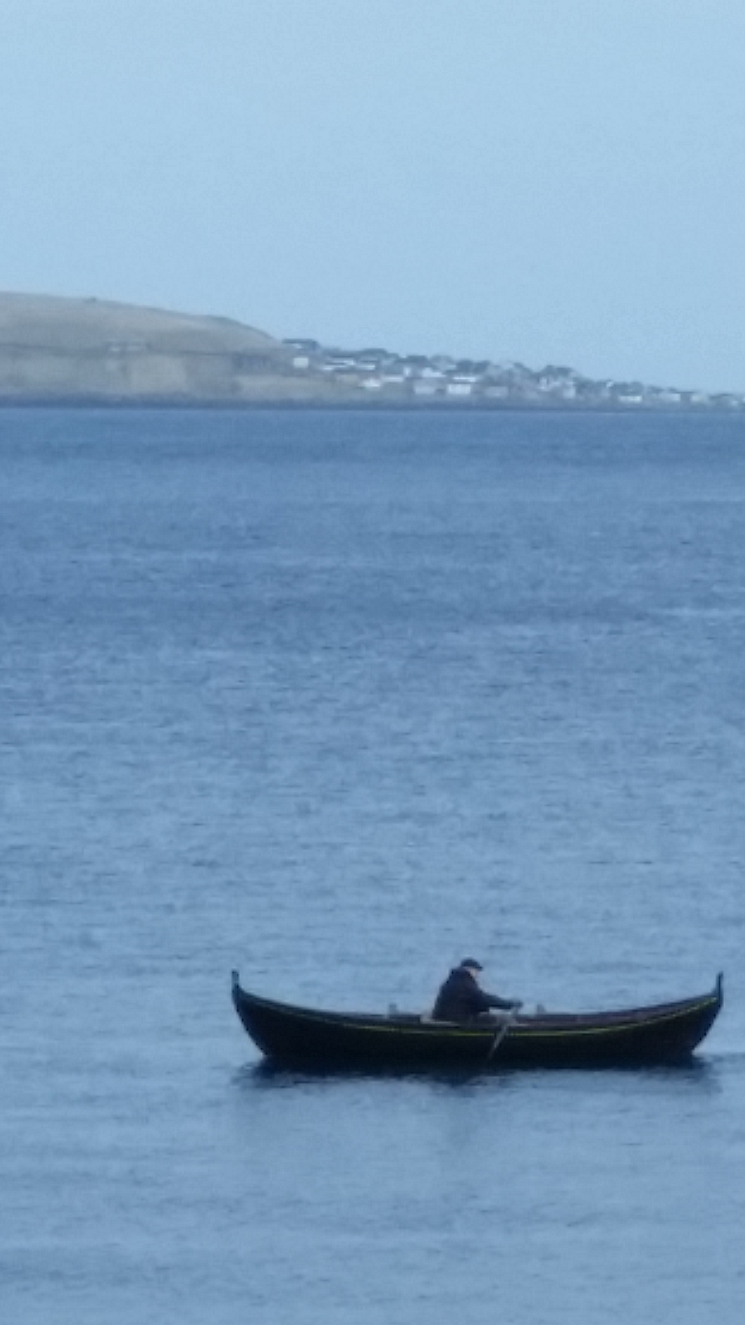 דייג על סירת משוטים באיי פארו